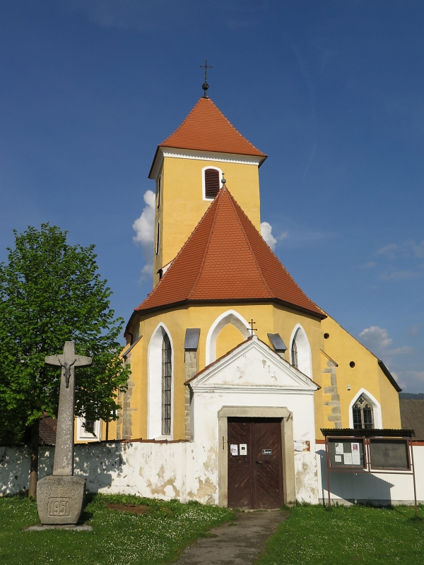 Kostel svaté Máří Magdalény, náves, Černice (Mojné).